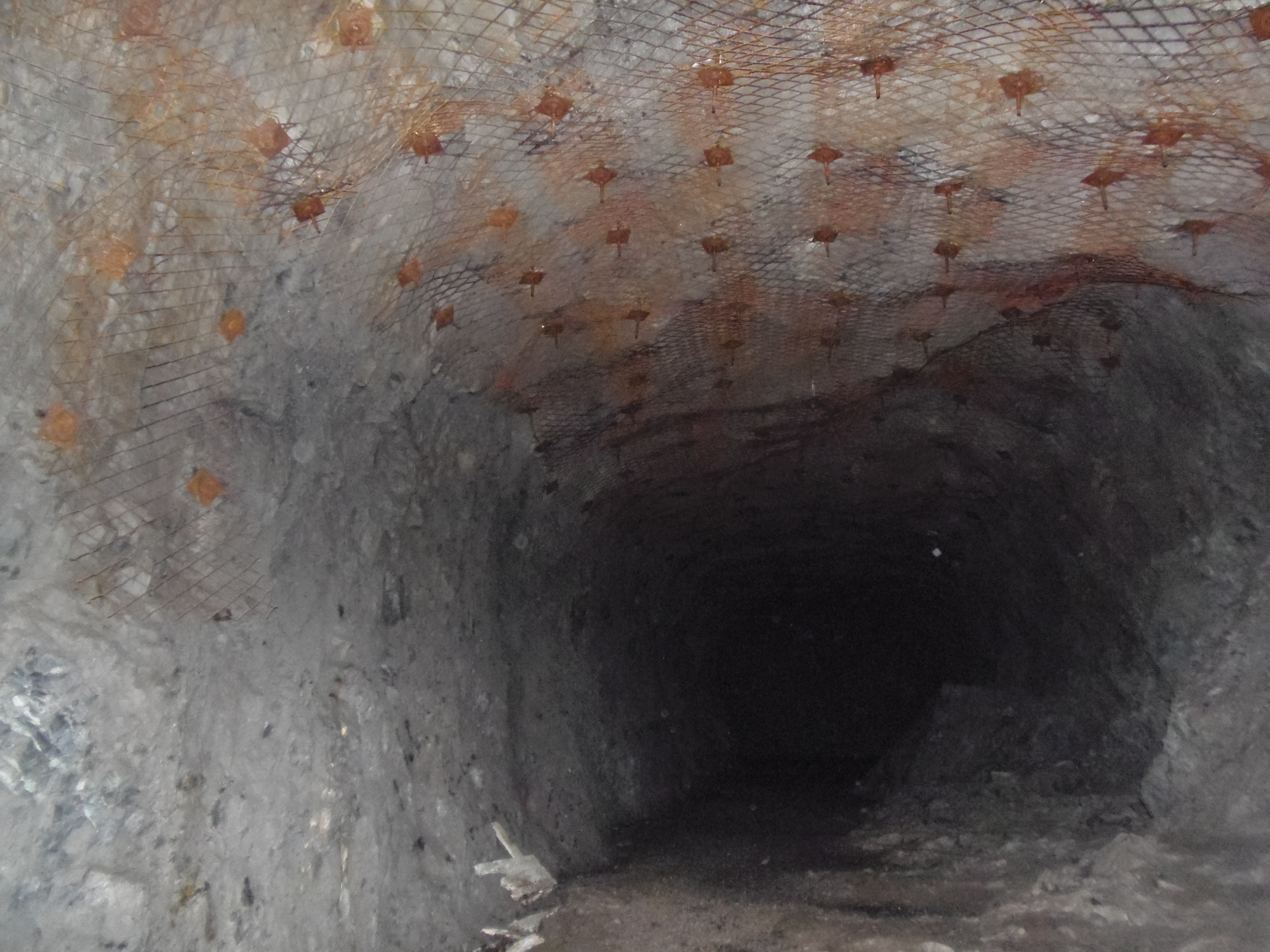 Tunel/korytarz w podziemnym mieście Hitlera